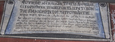 Ктиторският надпис от църквата „Свети Димитър“ в Тушин, Егейска Македония, Гърция.